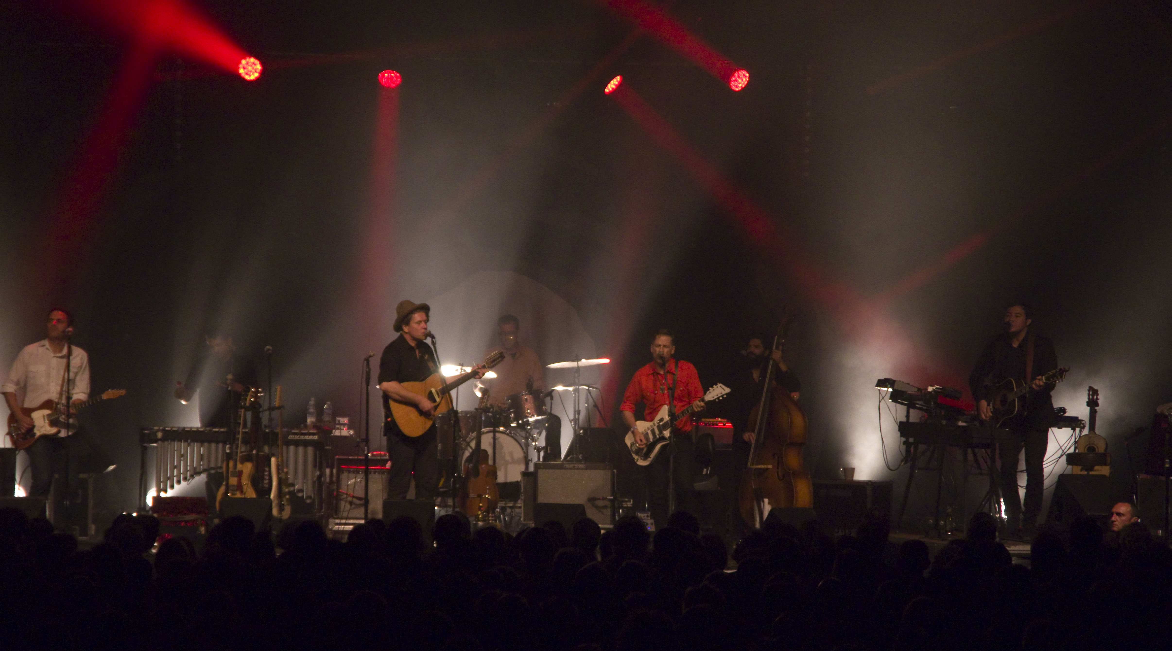 Das Zelt-Musik-Festival 2016 in Freiburg im Breisgau 13.07.2016 Calexico